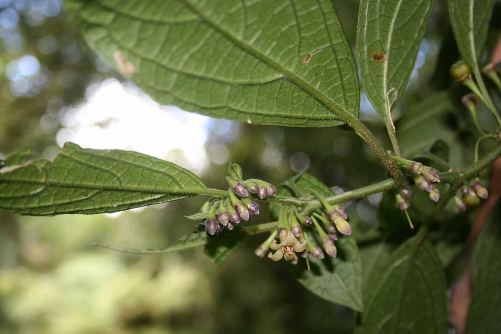 Witheringia coccoloboides, Nachtschattengewächse (Solanaceae) - Costa Rica: Prov. Alajuela, Parque Nacional Volcán Poás, 2550-2600 m